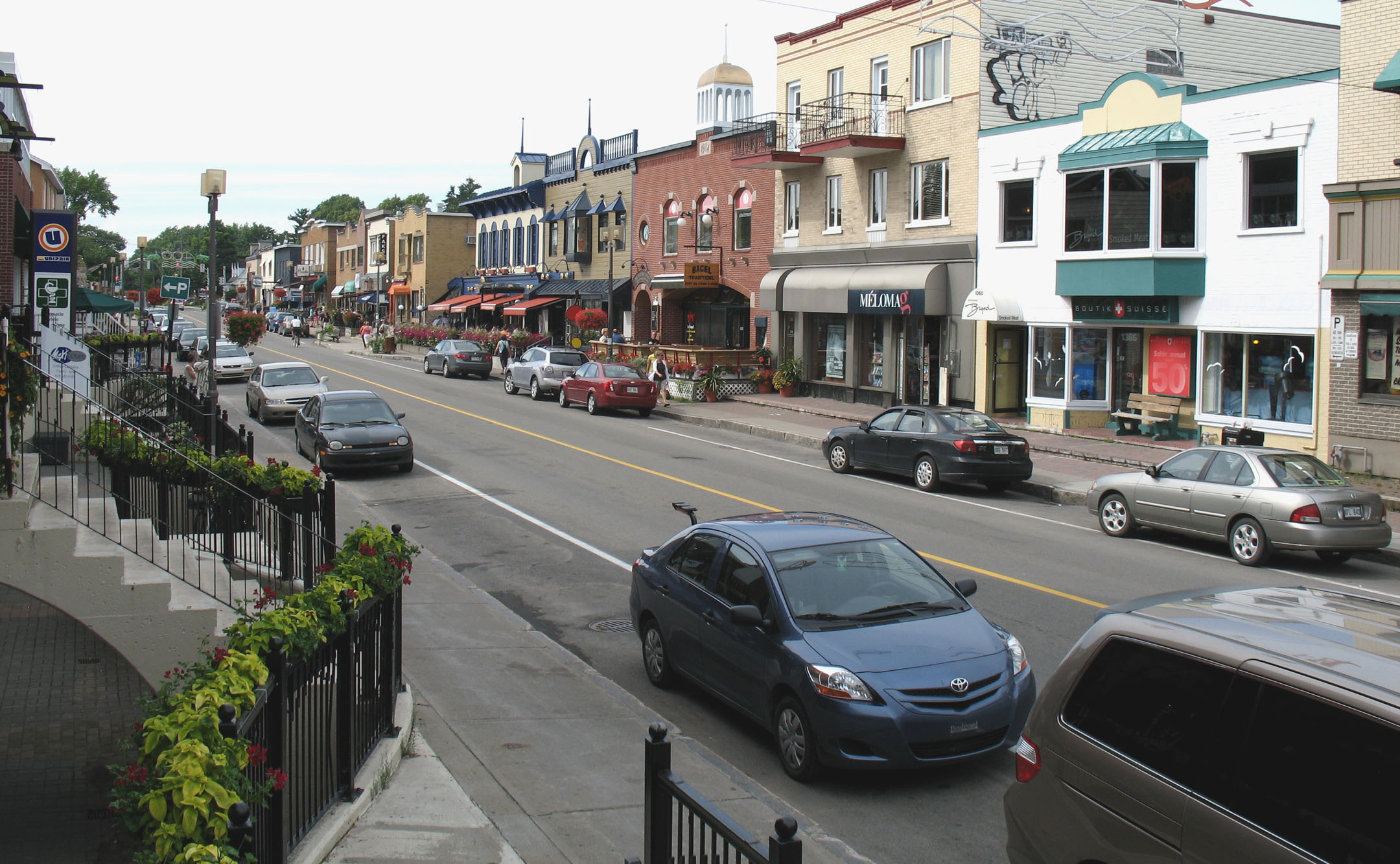 Avenue Maguire, une des principales artères commerciales située dans le quartier Sillery de l'arrondissement Sainte-Foy–Sillery à Québec. Province de Québec, Canada.